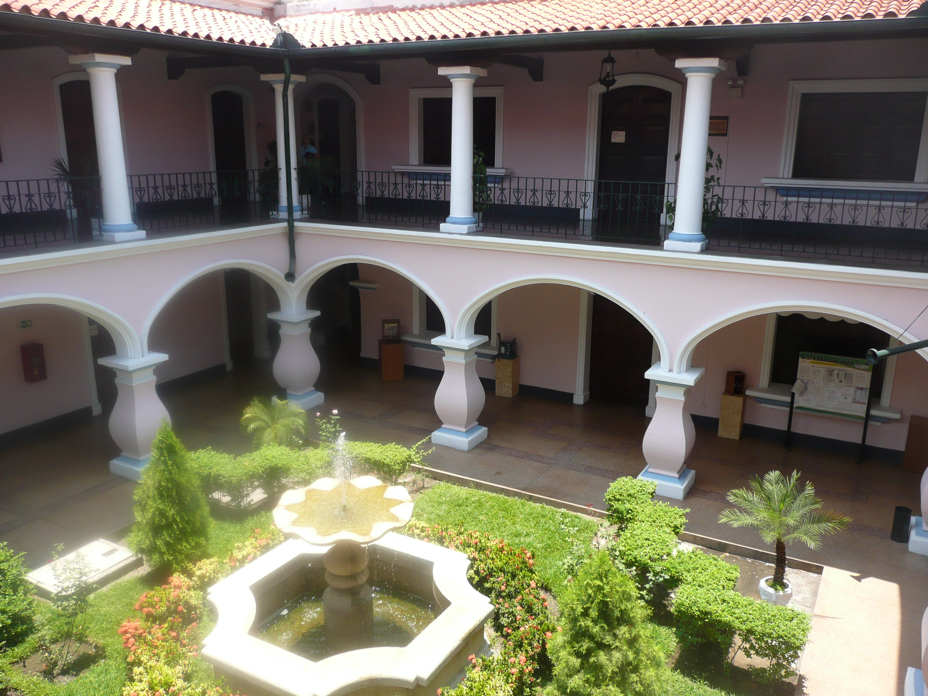 Lugar / place / lieu : Maracay, Estado Aragua, Venezuela.